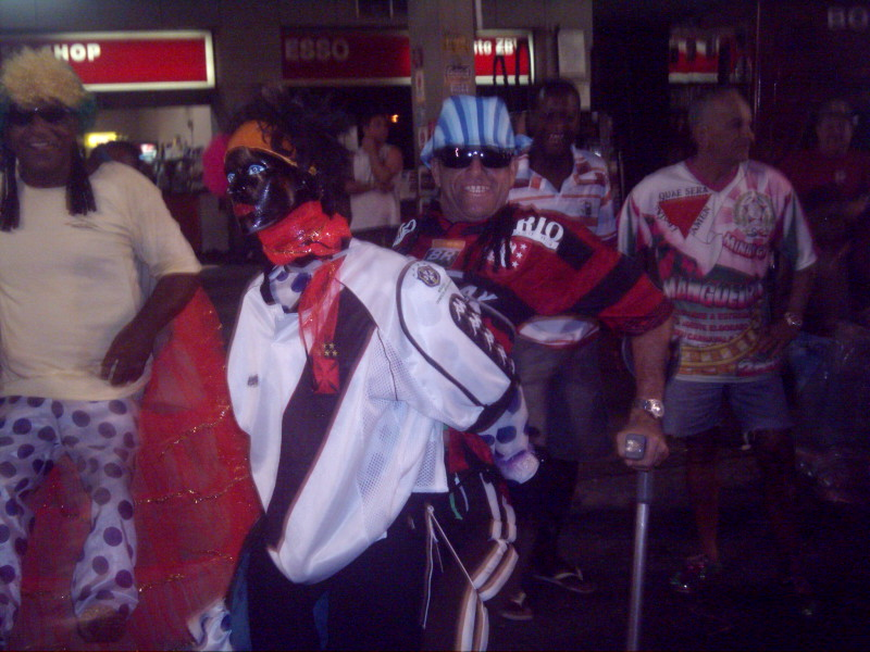 Folião durante o carnaval 2009, na Estrada Intendente Magalhães, cidade do Rio de Janeiro.